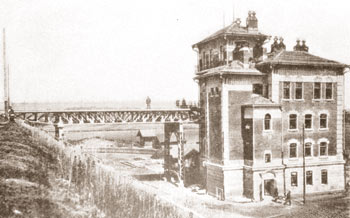 Здание вокзала на остановочном пункте Потылиха